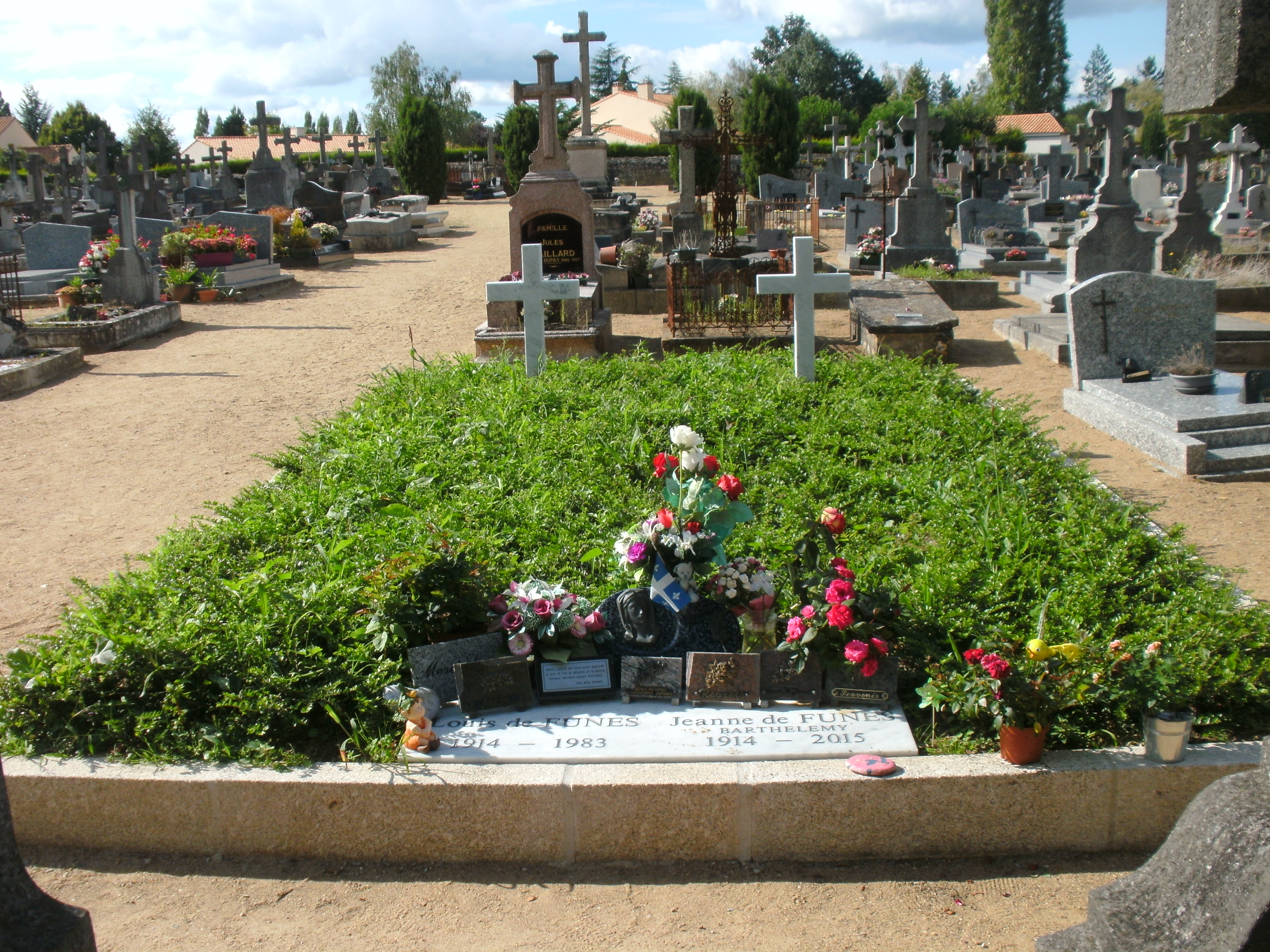 Das Grab von Louis de Funès und seiner Frau Jeanne-Augustine de Funes Barthélémy in Le Cellier